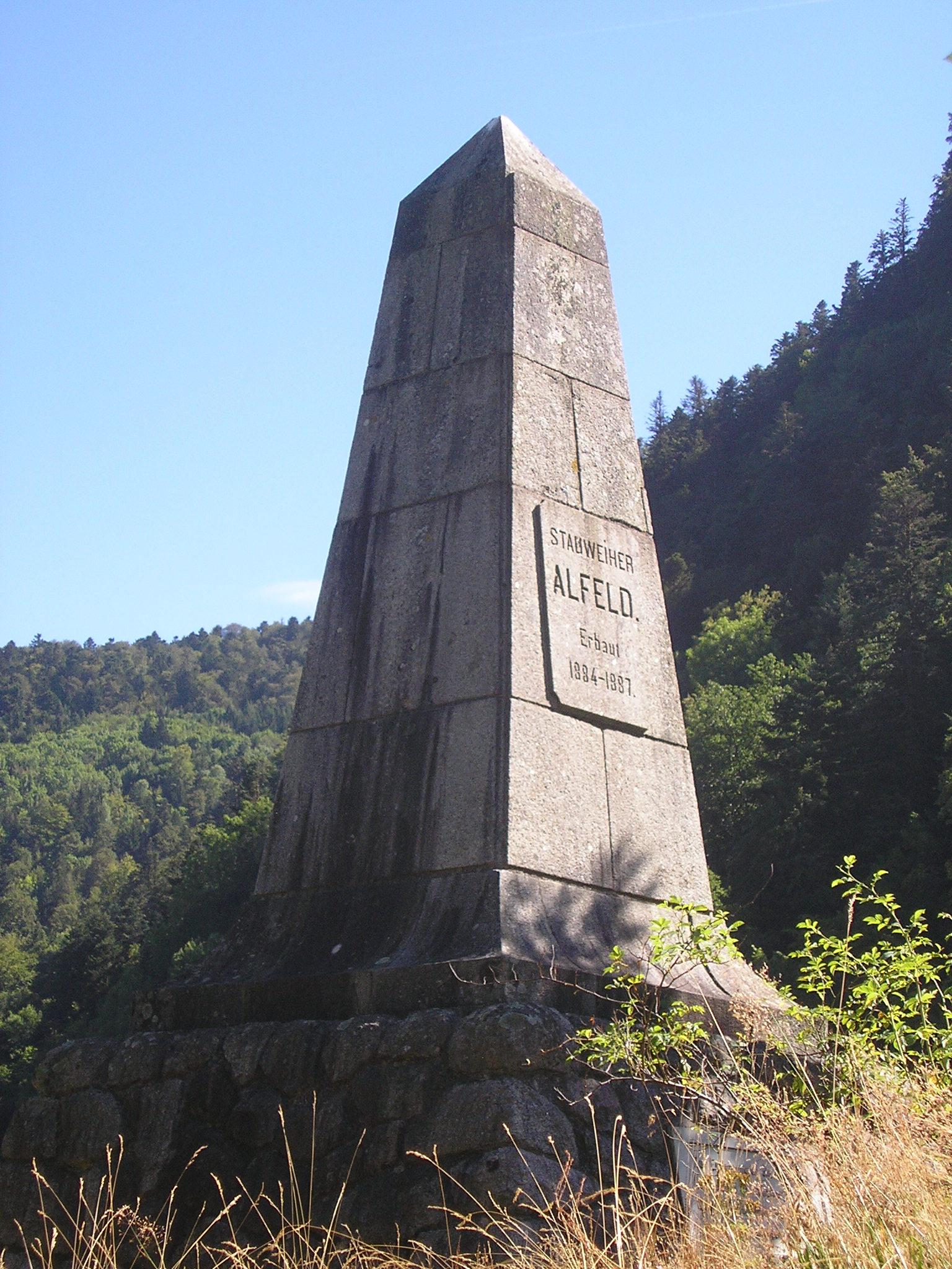 Photo de la stèle du barrage d'Alfeld